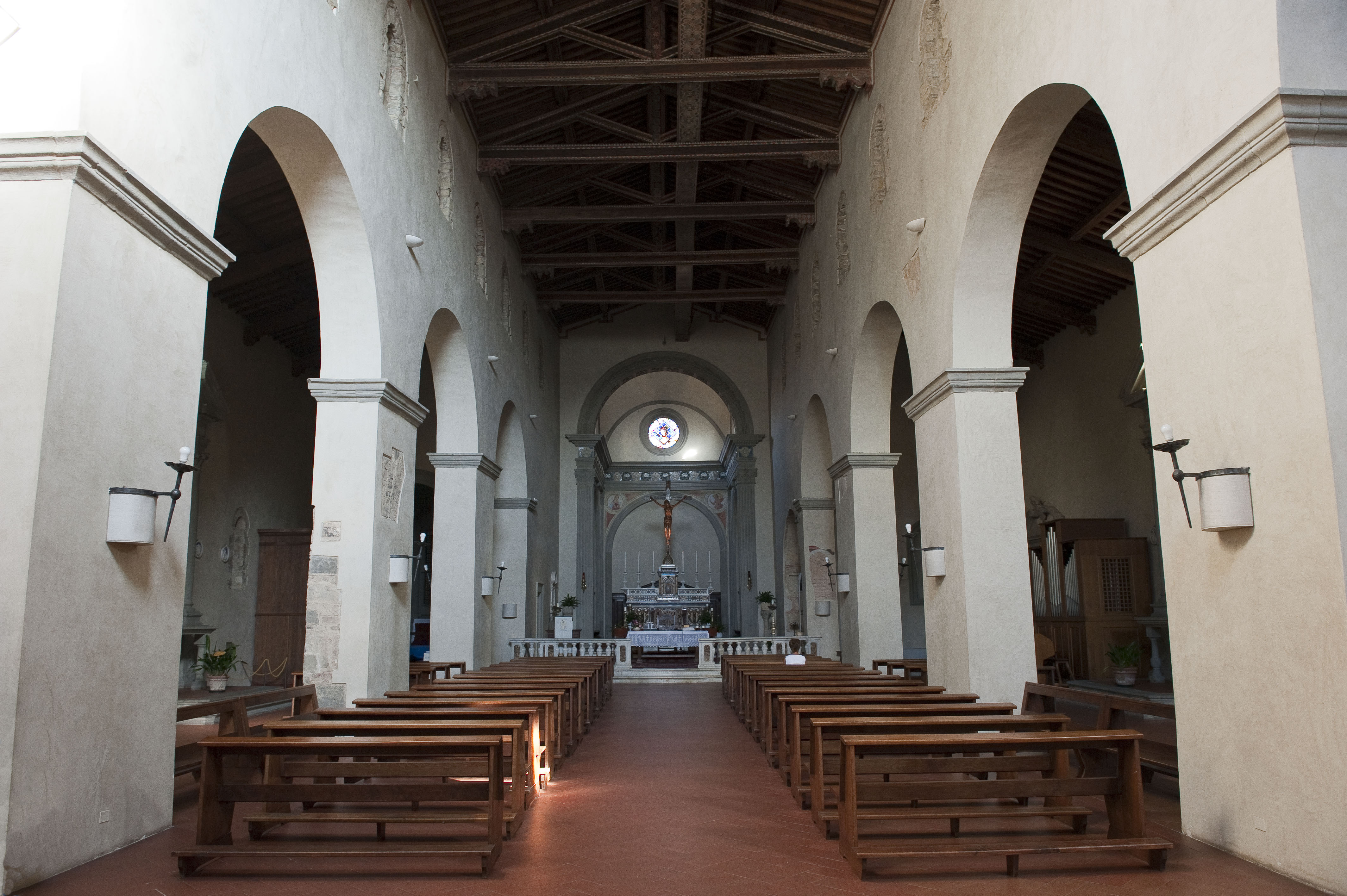 Interno della chiesa de iSanti Salvatore e Lorenzo a Settimo (Scandicci)